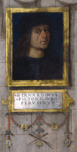 en los frescos de la Capilla Baglione